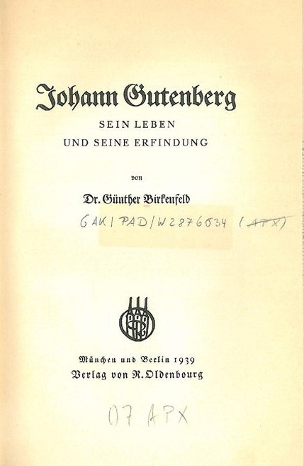 Günther Birkenfeld Gutenberg 1939 Titel